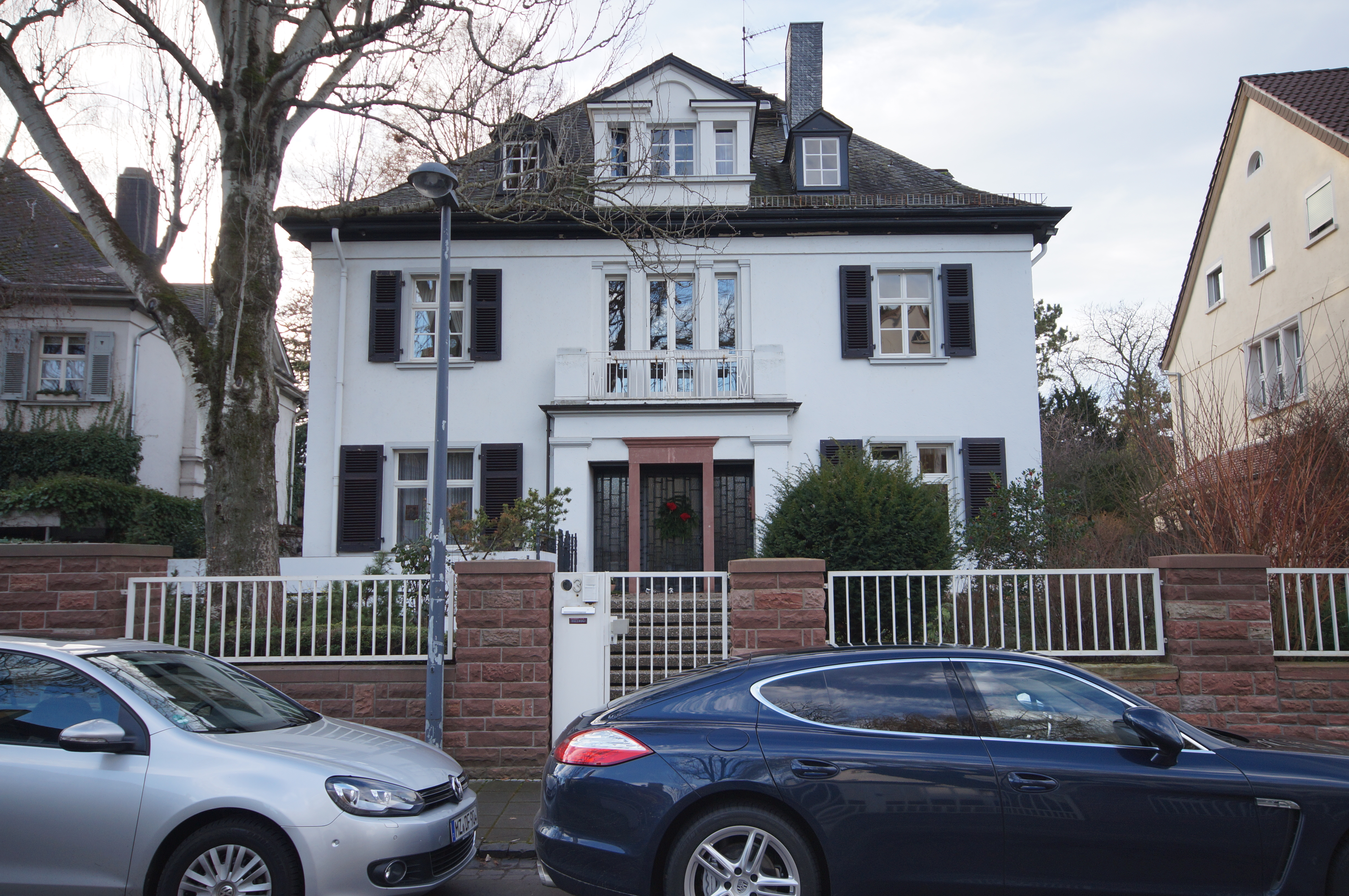 Die Fassade der Einzelvilla Am Klostergarten 3 in Mainz-Oberstadt